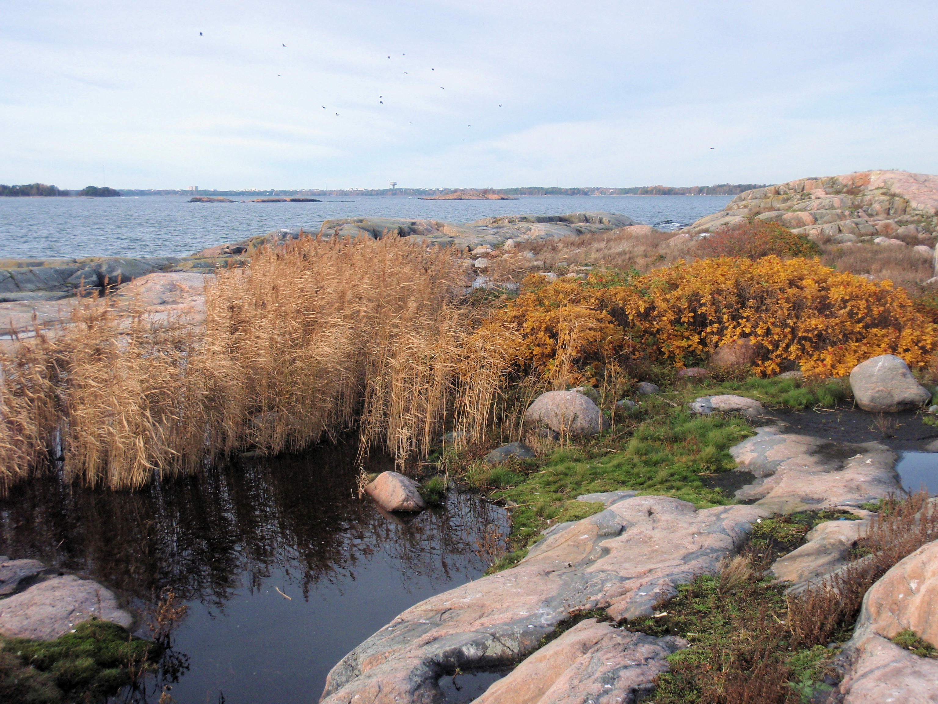 Painanne Harmaakari-nimisen saaren pohjoisosassa Helsingissä